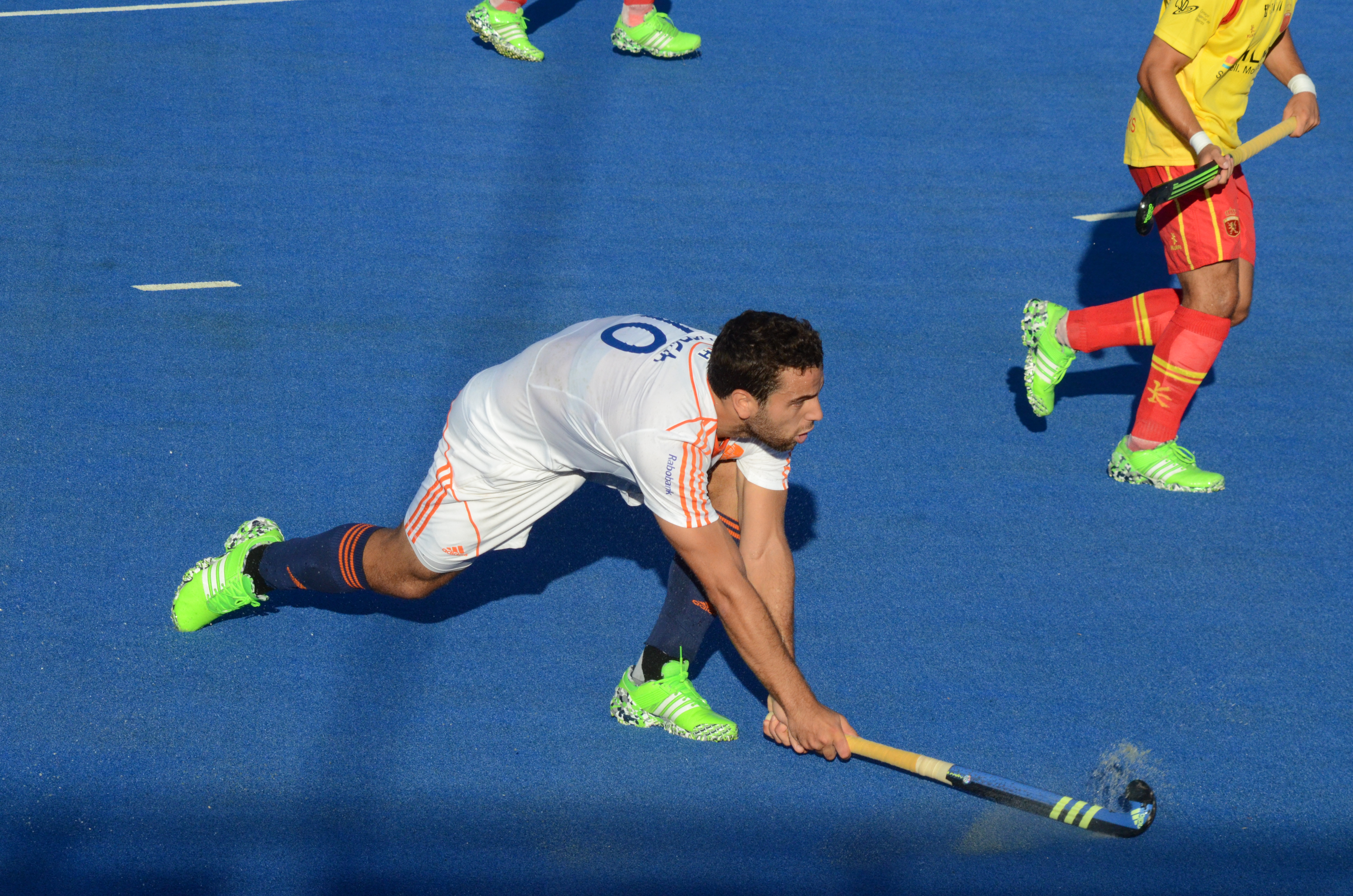 Eurohockey 2015 - Netherlands v Spain - Valentin Verga